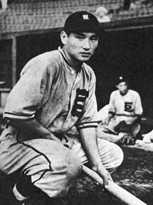 戦時中の川上哲治